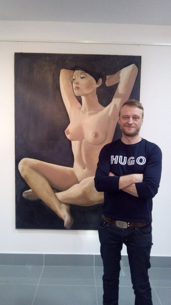 Стыльский Юрий, выставка (Брест)